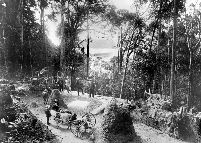 Repronegatief. Het eerste punt van de Gajoweg in aanleg, Atjeh, Noord-Sumatra